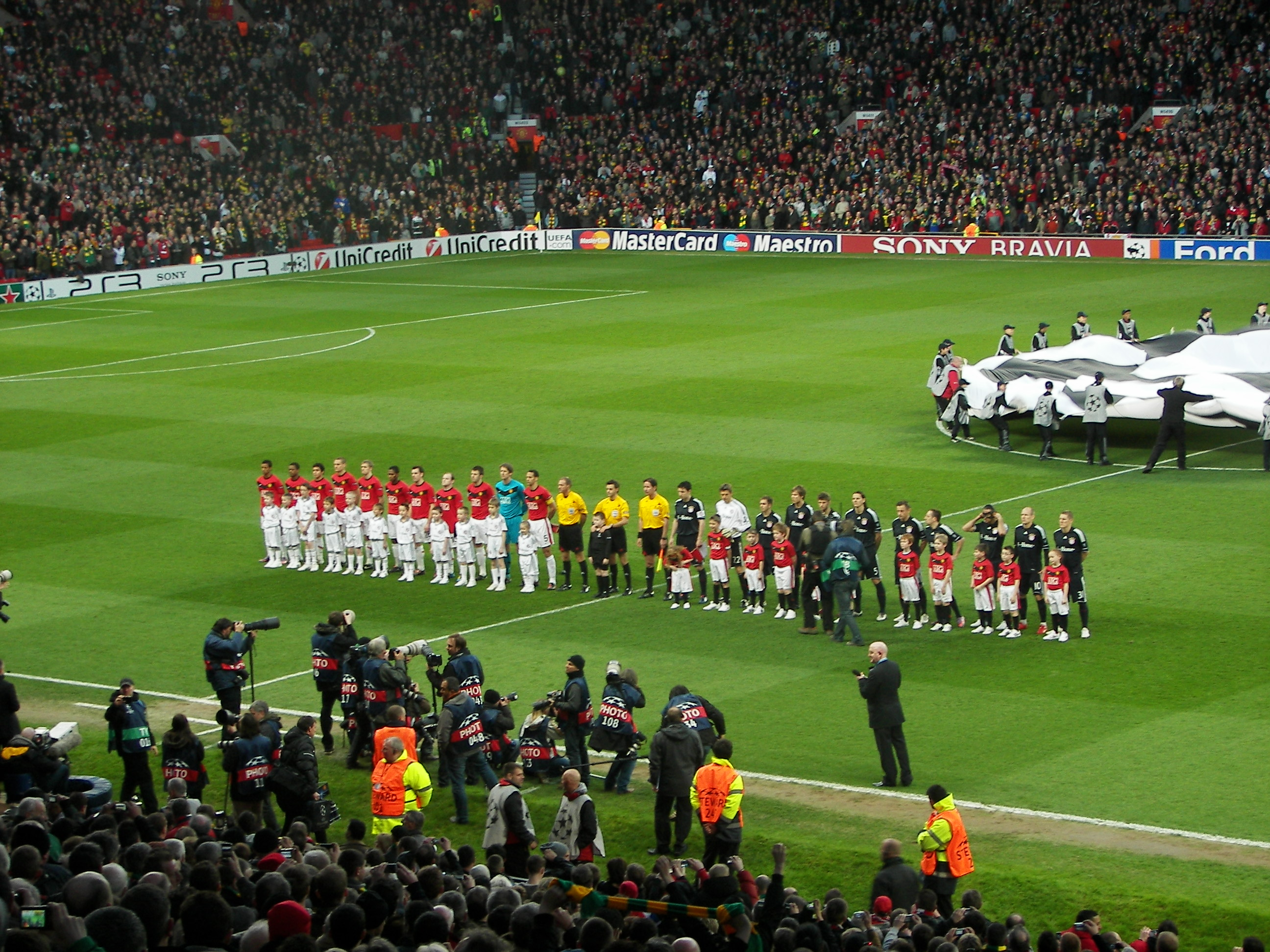 Reise mit dem FC Bayern nach Manchester.